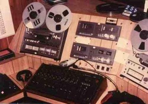 Banco di Regia via Santuario delle Grazie